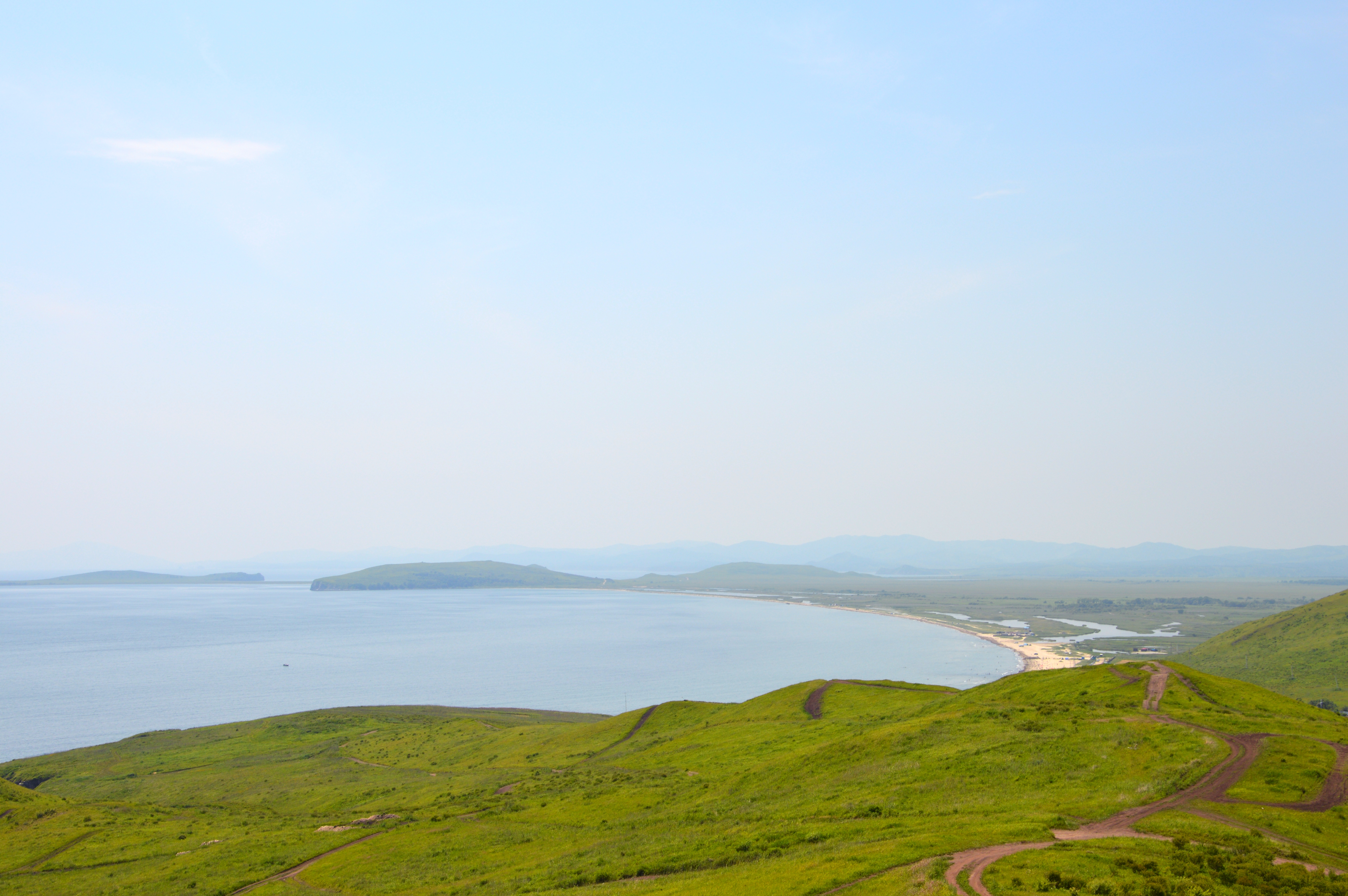 Бухта Баклан и муниципальный пляж Маньчжурка Славянского городского поселения Хасанского района Приморского края